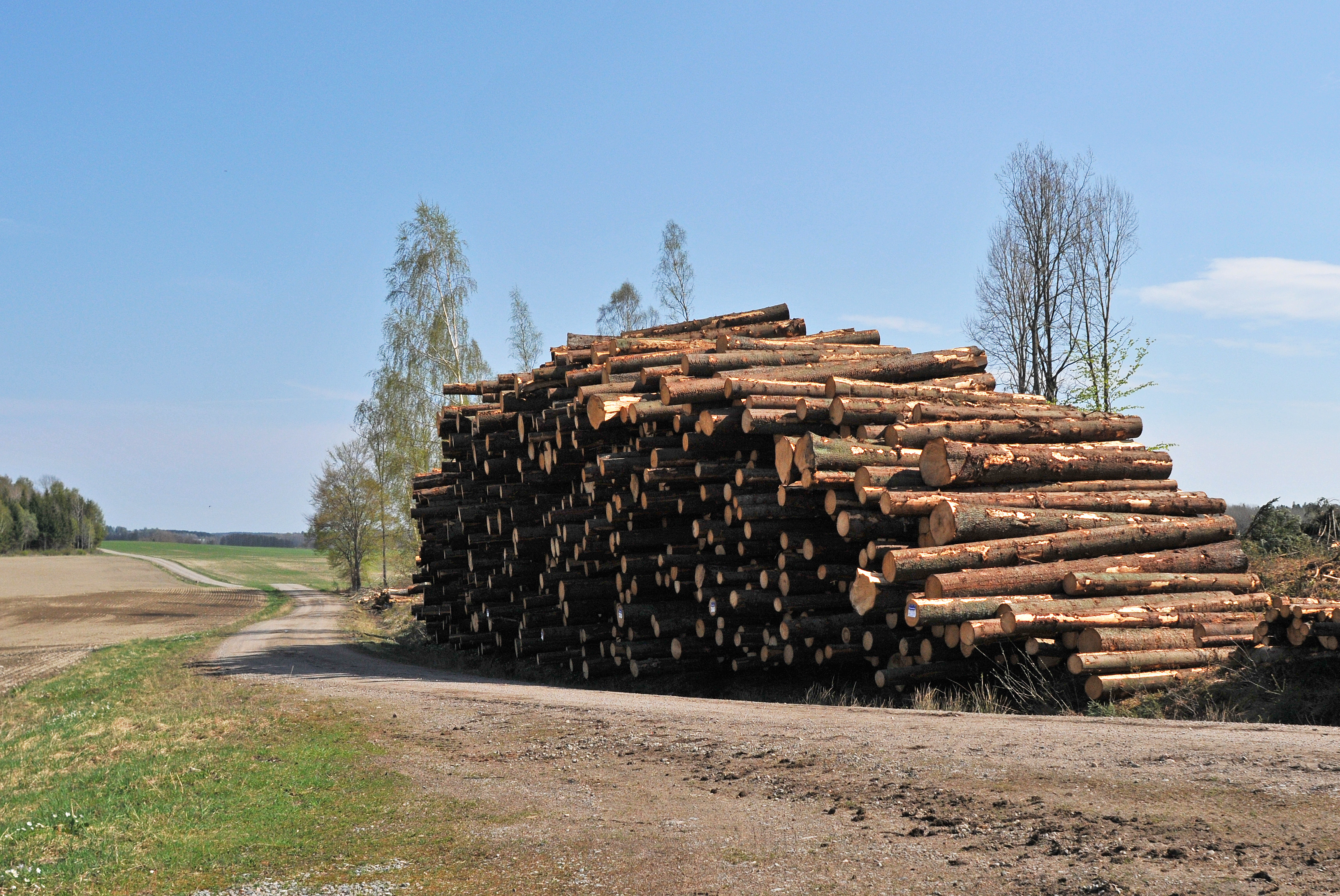 Timmervälta vid Nääs säteri i Södermanland.